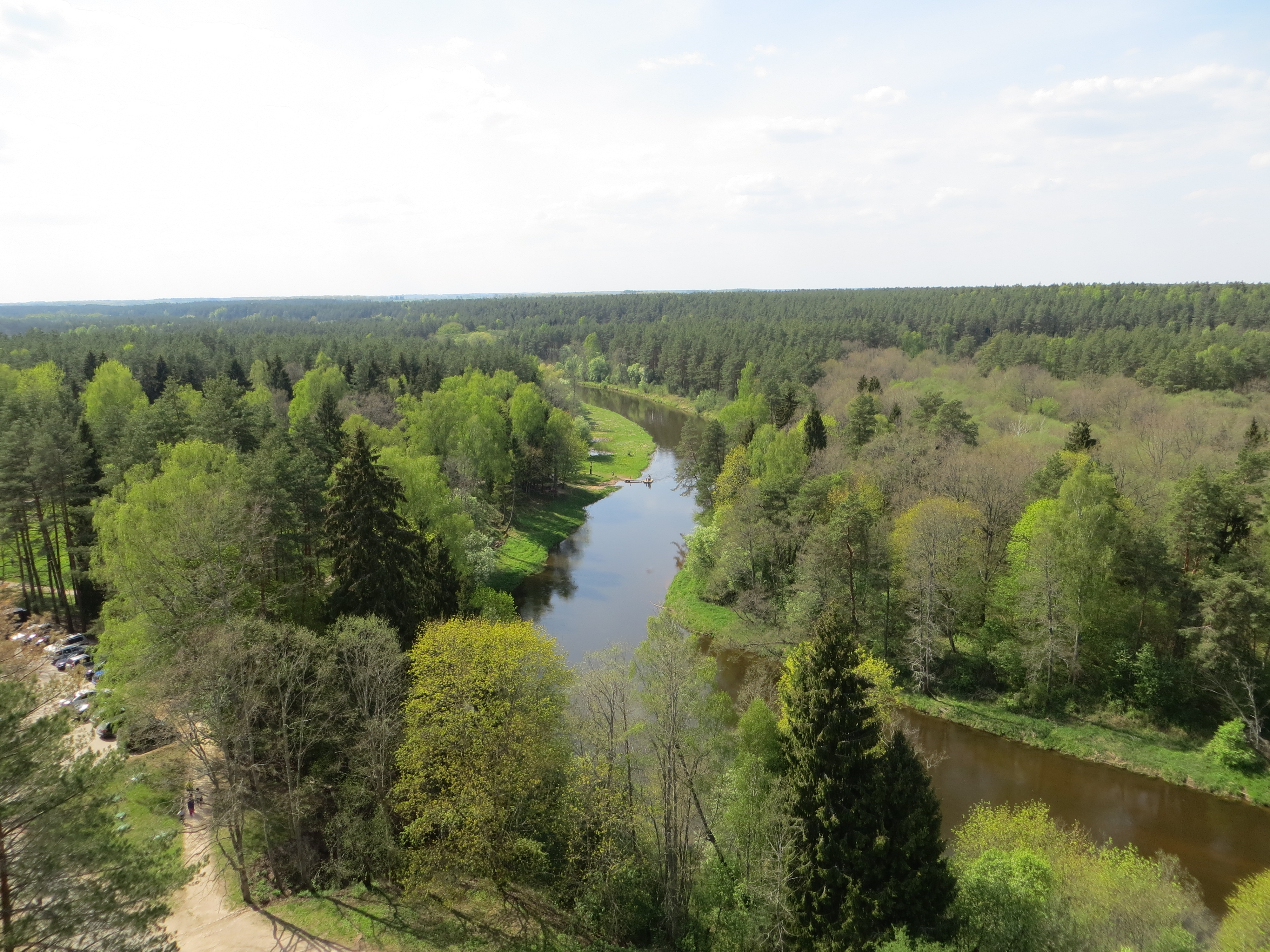 Anykščių sen., Lithuania